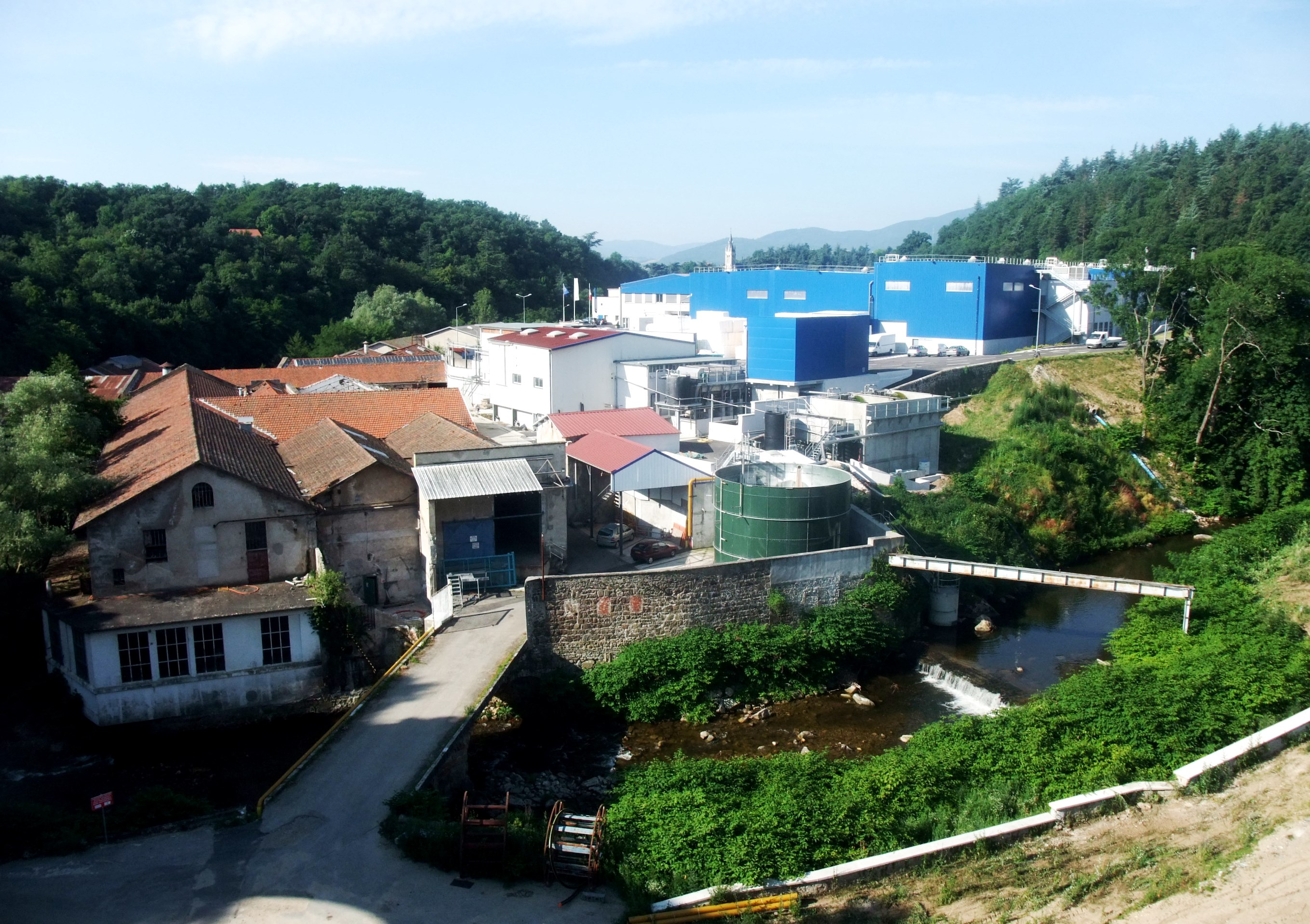 Davézieux Vidalon MP Hygiène